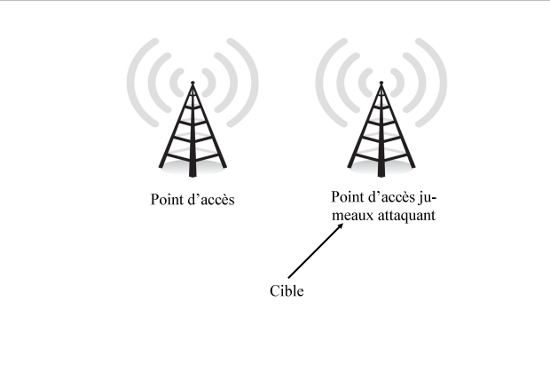 EvilTwinWireless